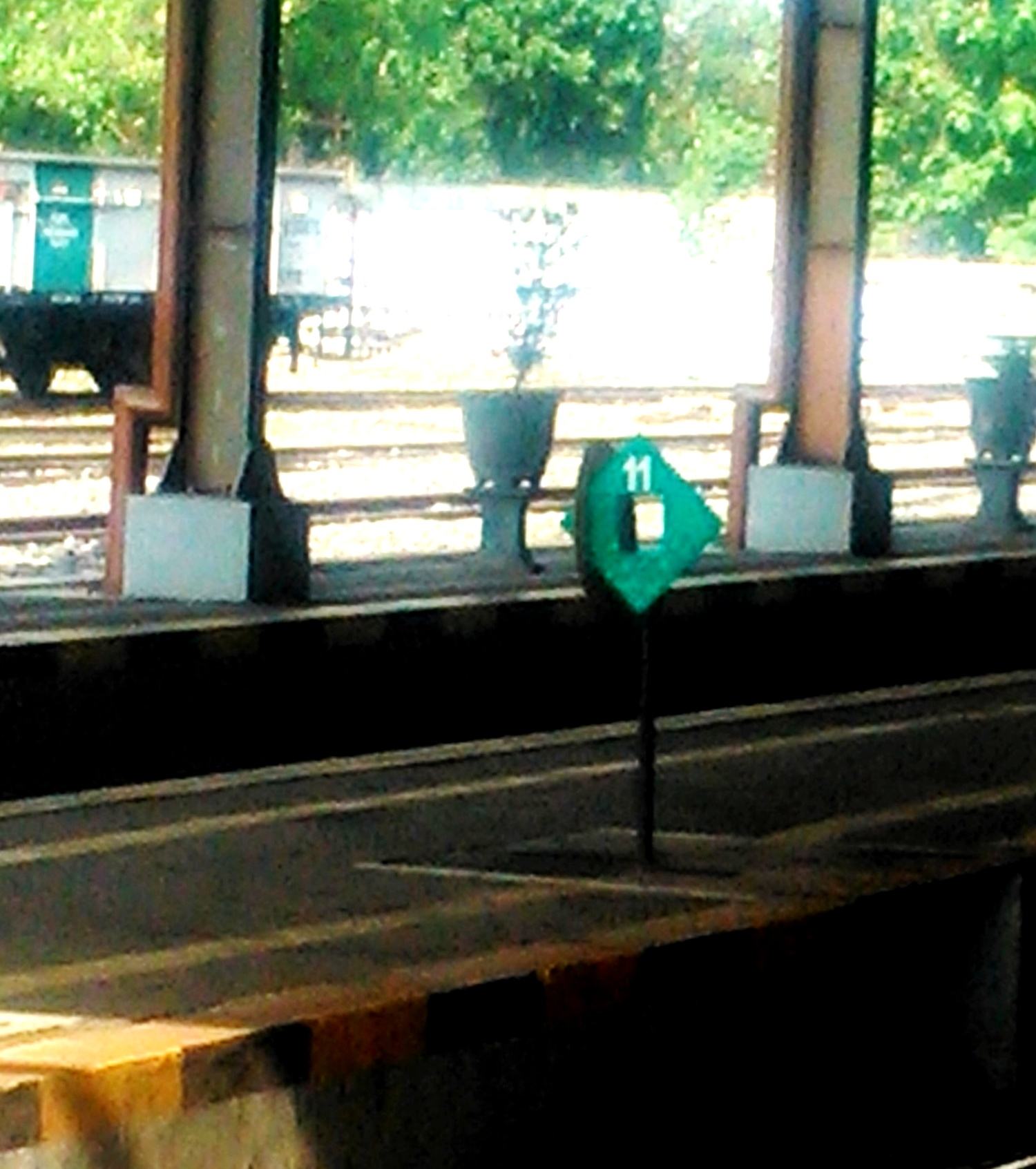 Semboyan 11A dengan papan belah ketupat hijau tampak, menandakan wesel terpasang jalur lurus